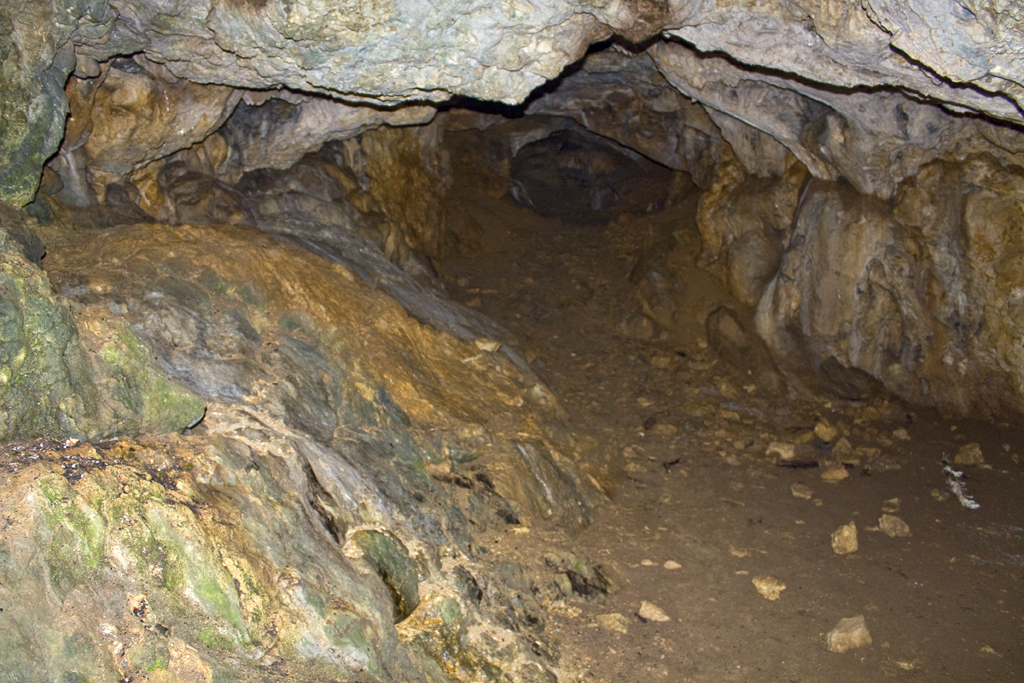 Na početku ulaza u Donju Baraćevu špilju.